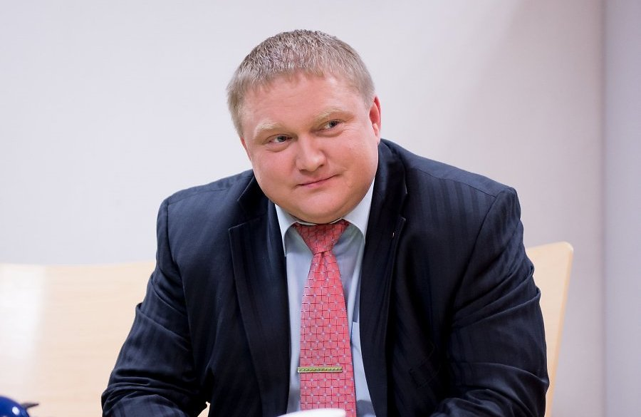 Kajar Lember